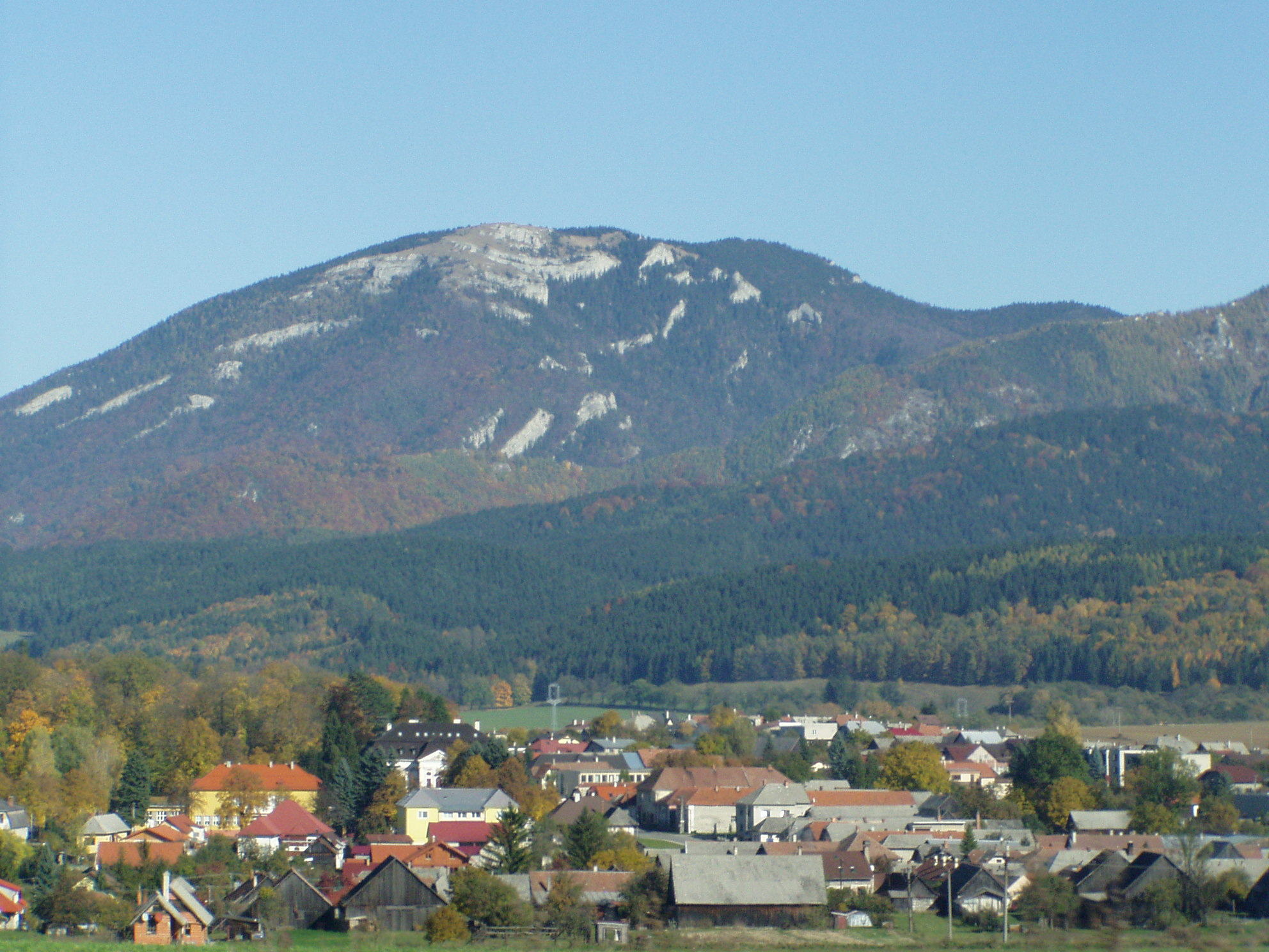 Pohľad od Mošoviec